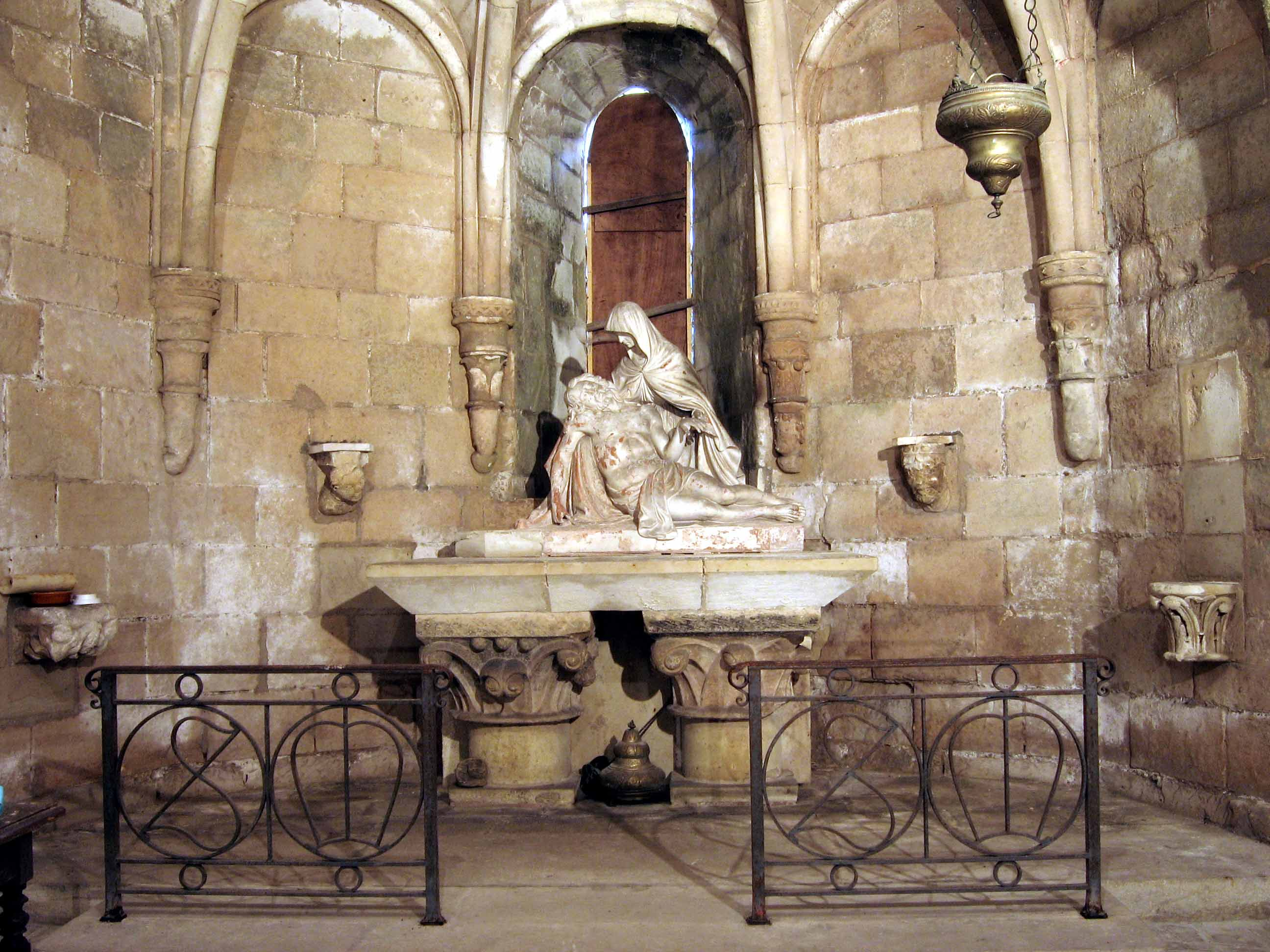 photo Pieta